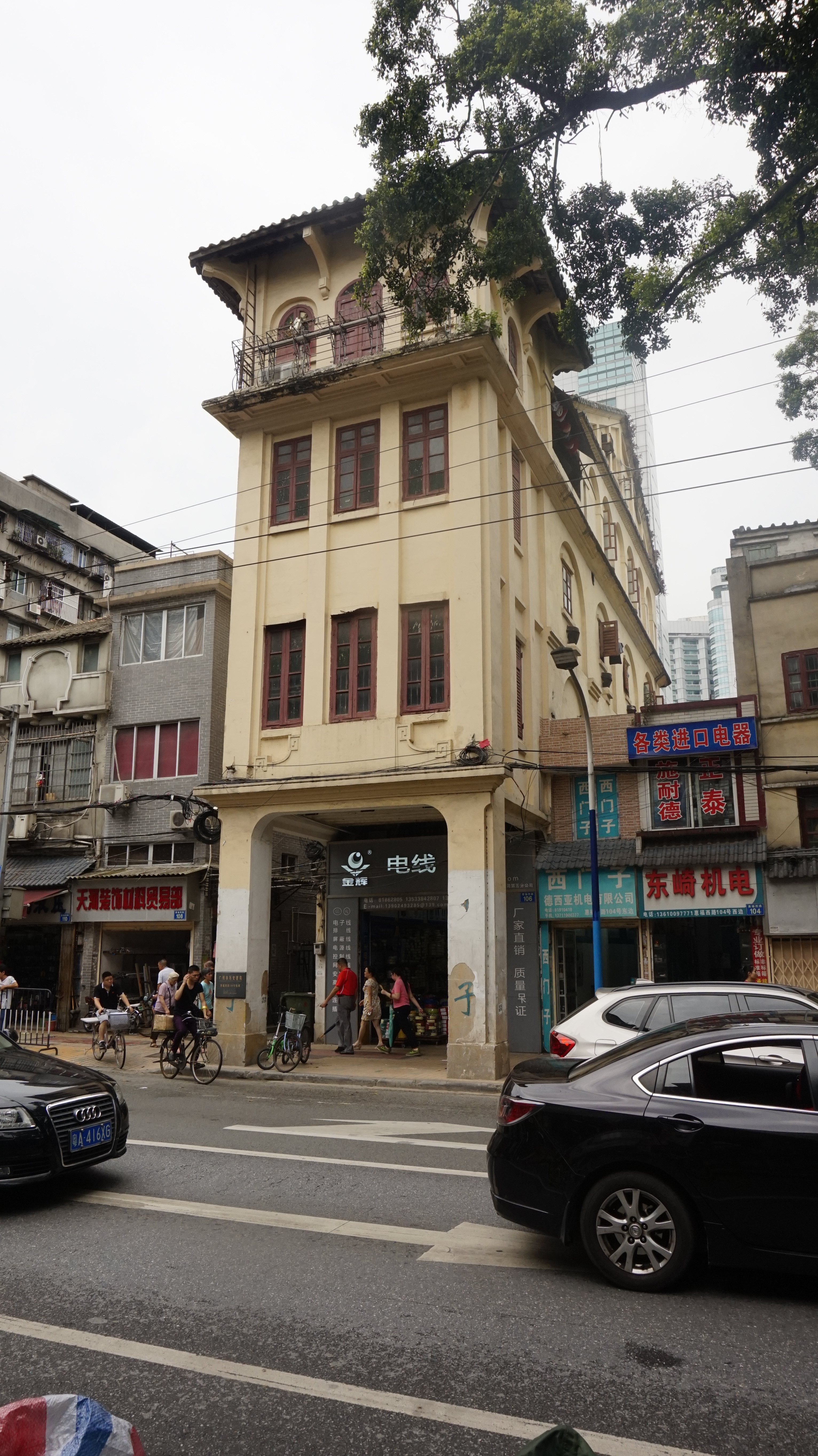 中文（中国大陆）: 位于广东省广州市越秀区惠福西路106号。